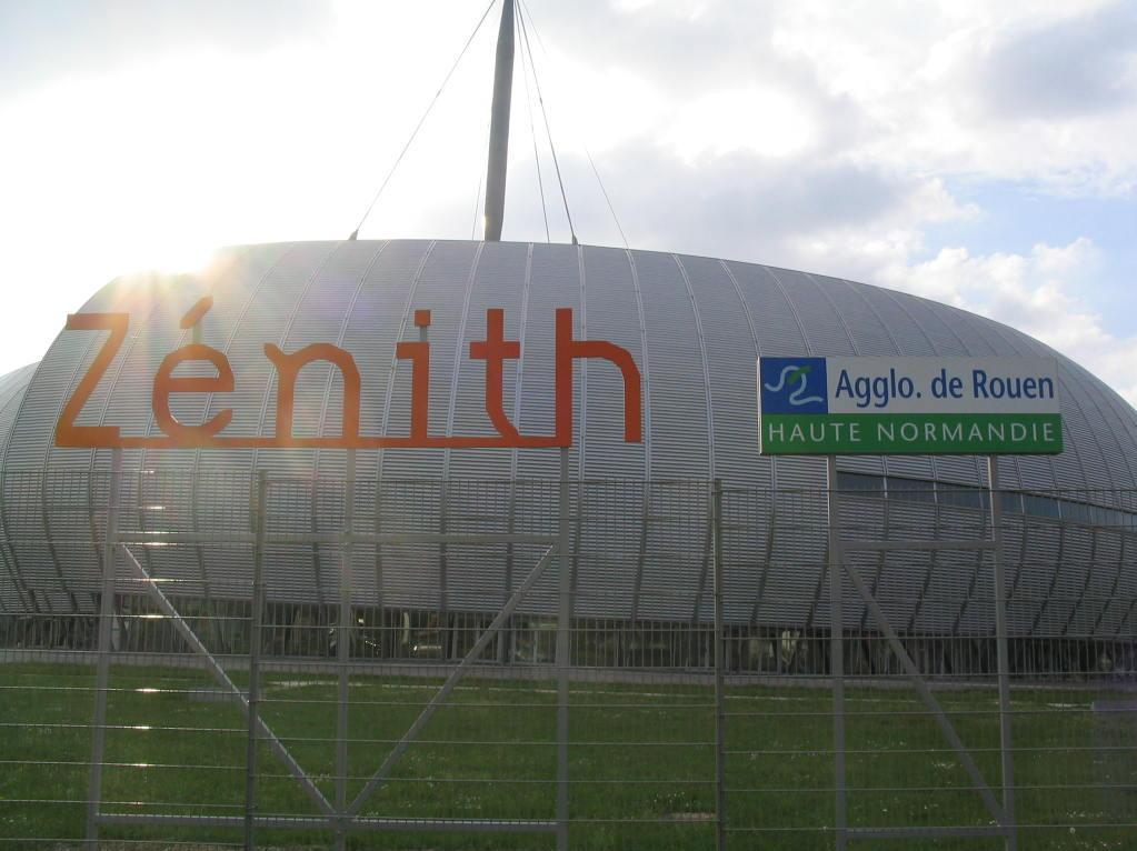 Zénith de Rouen de jour